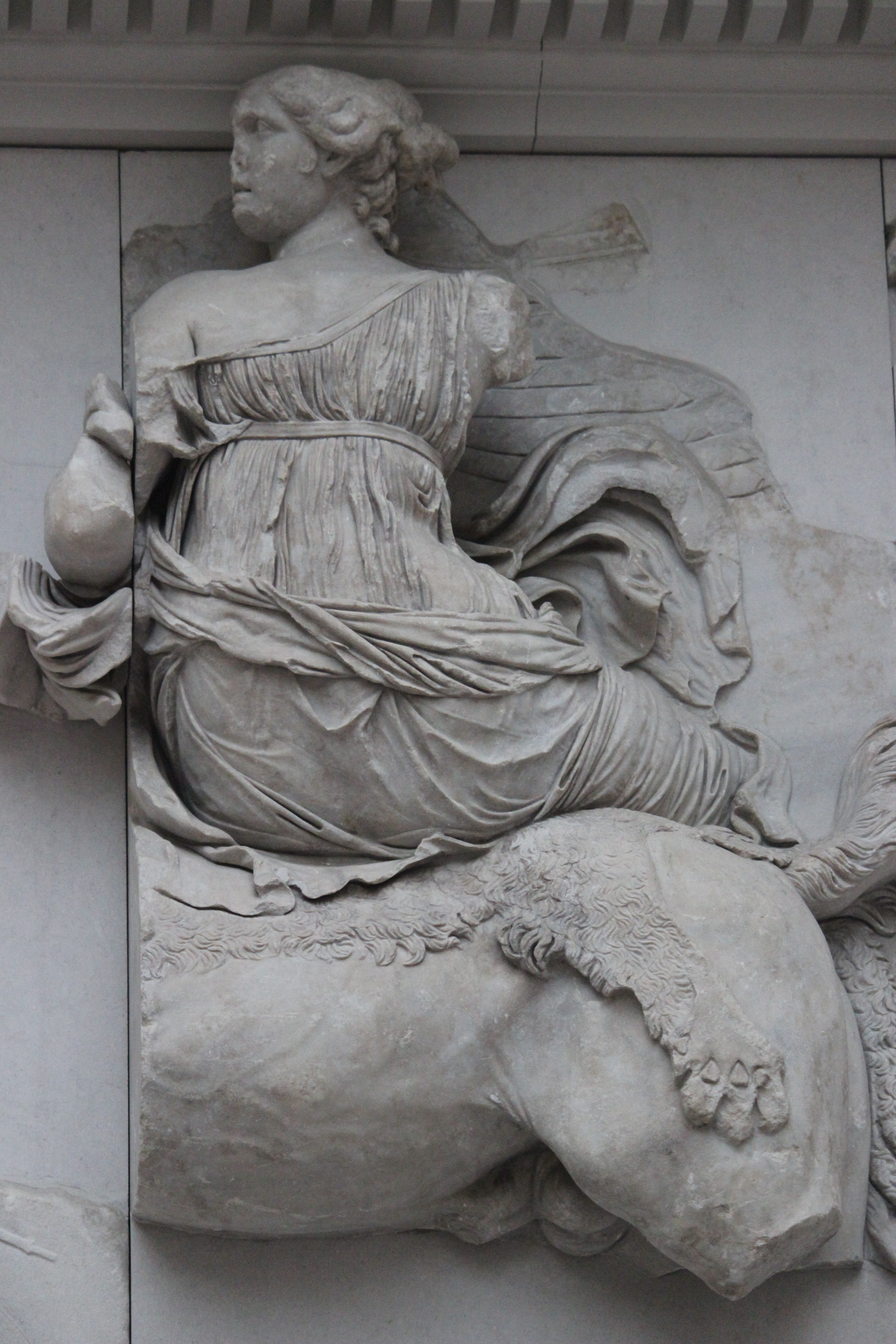 Selene lucha contra los gigantes. Altar de Pérgamo.